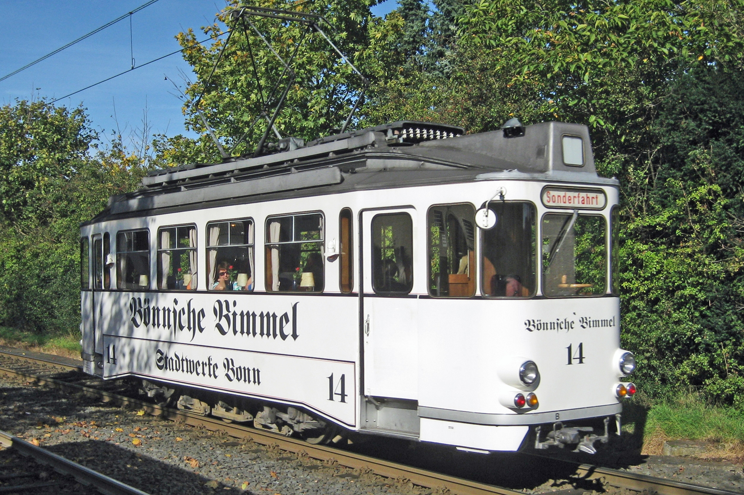 Historische Straßenbahn „Bönnsche Bimmel“ (18 Sitzplätze) auf der Strecke der Siebengebirgsbahn in Bonn-Beuel-Limperich